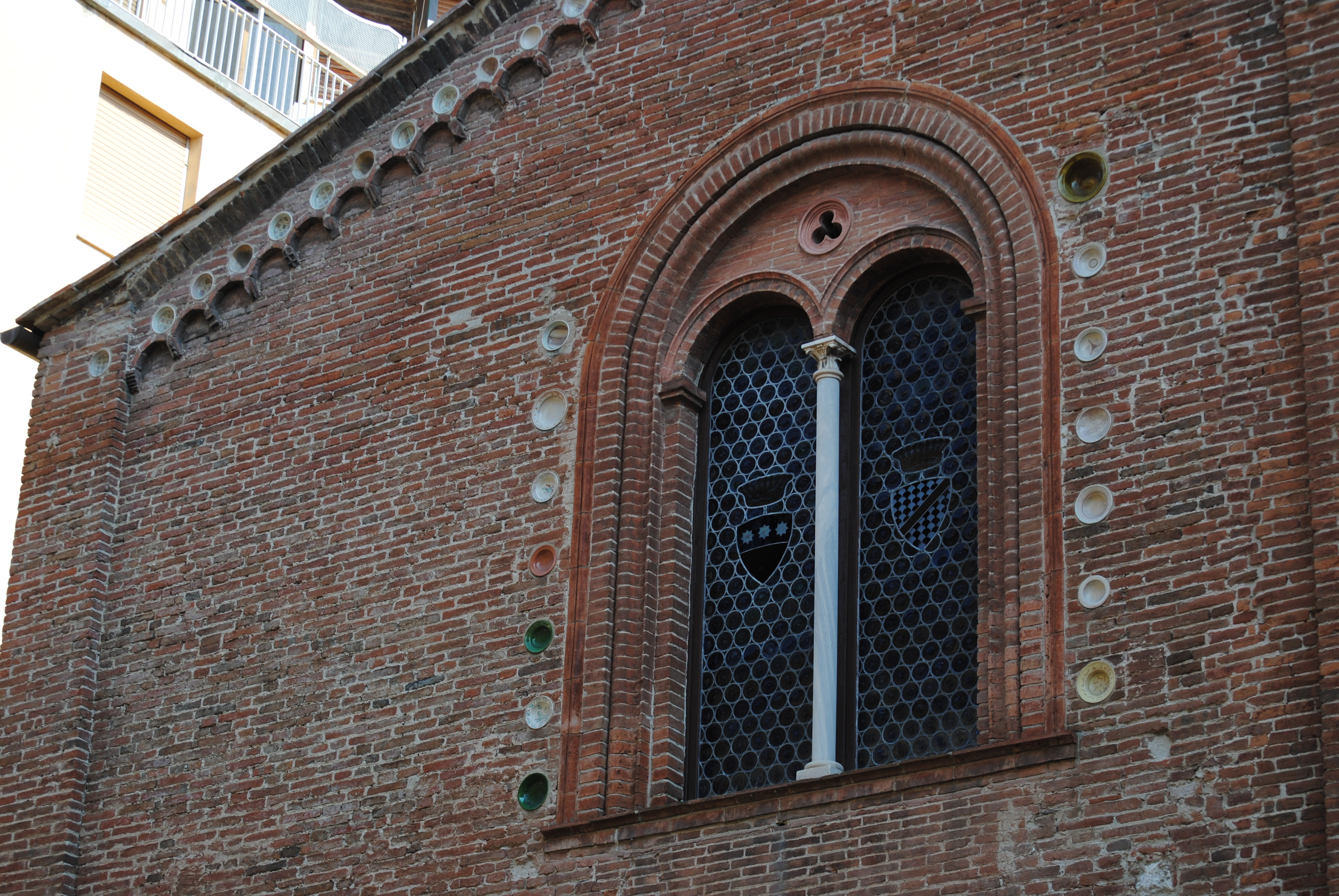 Bacini ceramici posti tra gli spioventi del tetto e gli archetti ciechi sulla facciata della chiesa di Santa Cecilia (Pisa). La bifora è abbellita ai lati da altri manufatti.